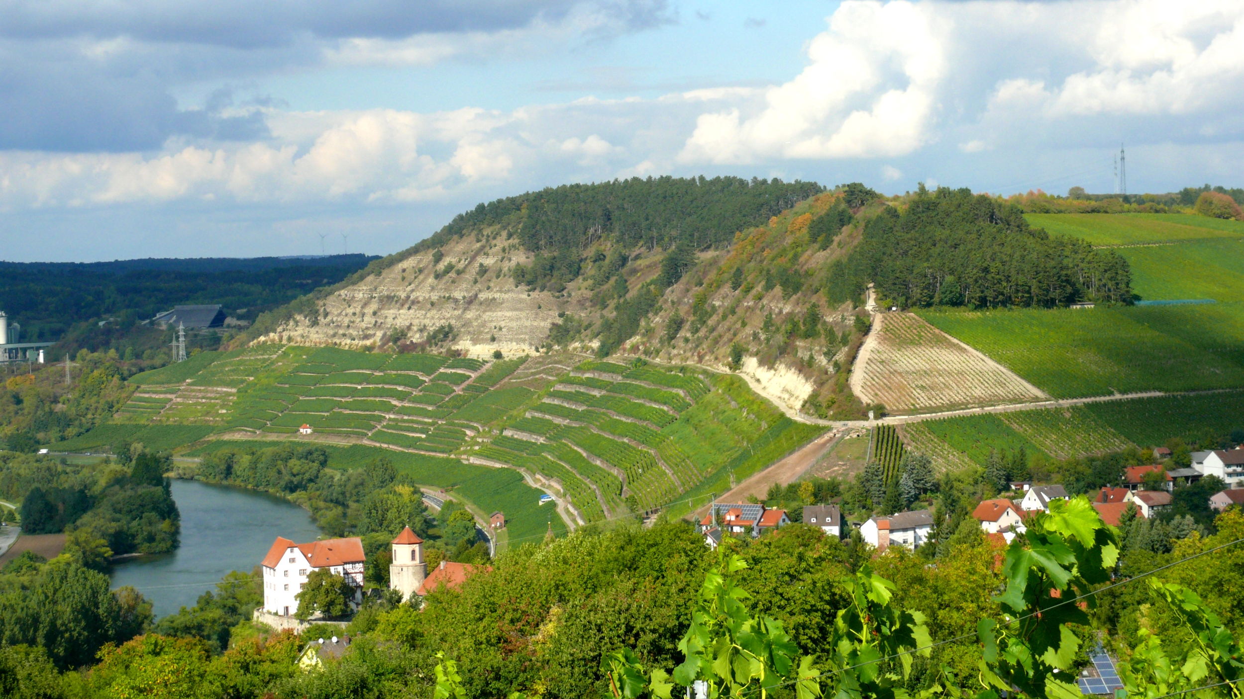 Kallmuth bei Homburg am Main; Blick aufs NSG „Kallmuth“ oberhalb der Weinhänge